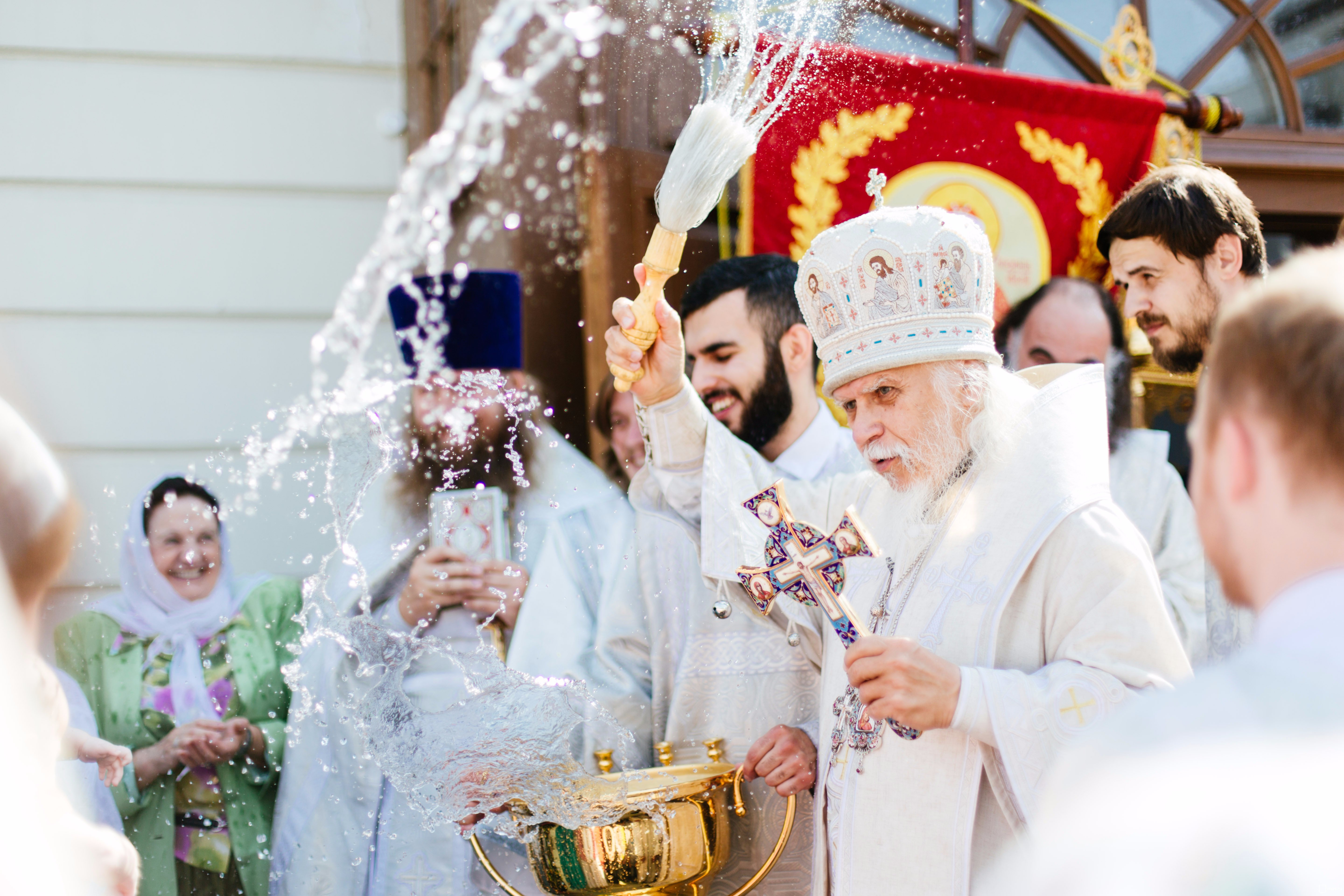 19 августа храм Преображения Господня на Преображенской площади отметил свой главный праздник. Открылся праздник торжественным богослужением, которое возглавил епископ Орехово-Зуевский Пантелеимон, викарий Восточного округа. После богослужения на площади рядом с храмом Владыка Пантелеимон совершил водосвятный молебен с освящением плодов нового урожая. В рамках официальной части мероприятия состоялось возложение цветов к памятнику воинов-преображенцев, военнослужащие Преображенского полка выступили с показательной программой. В программе праздника также был организован концерт и творческие мастер-классы для всех желающих.